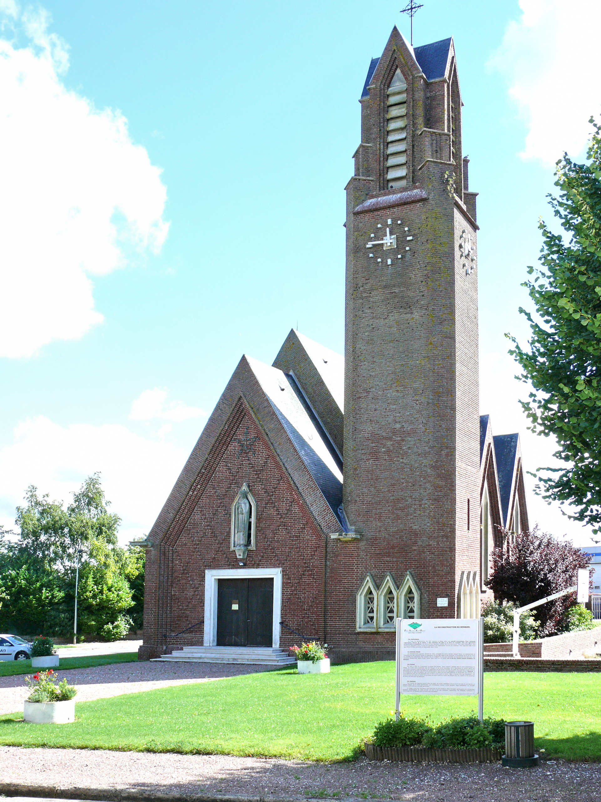 Bosquel (Somme - Picardie - France) : l'église Saint-Blaise